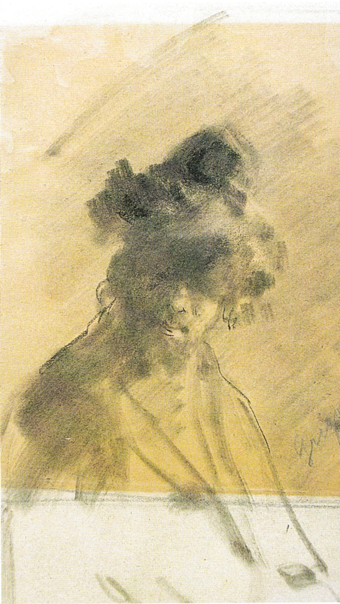 Schiță pentru - Evreu cu gâsca - Biblioteca Academiei Române, Cabinetul de stampe